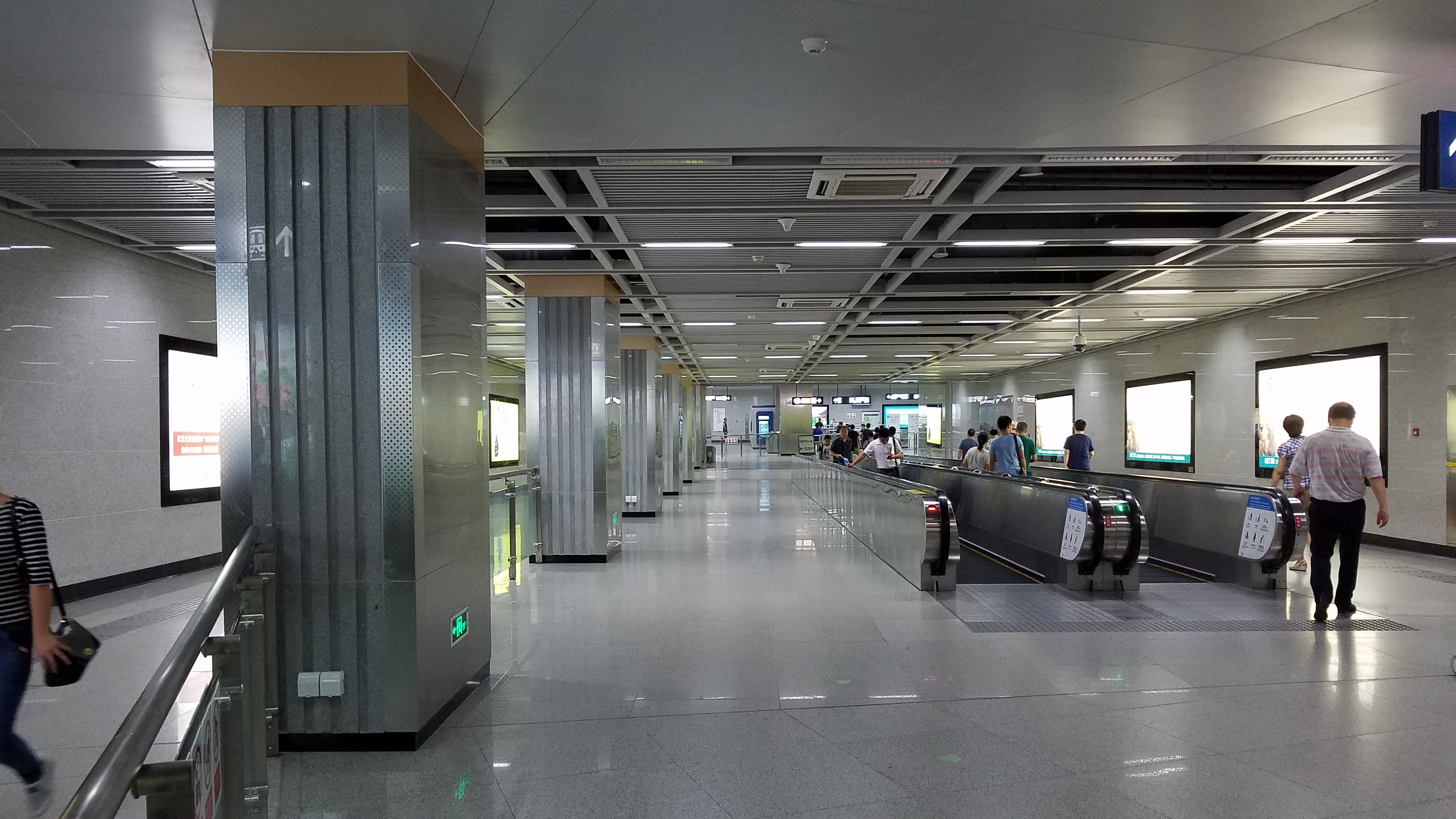 范湖站换乘通道往3号线方向。